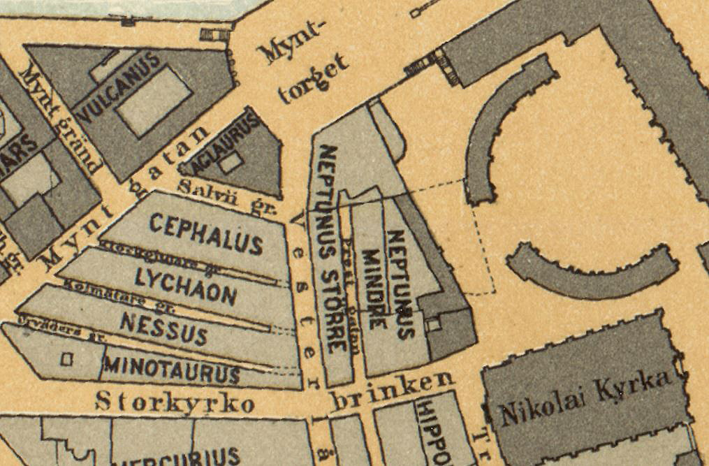 Del av Bentzers Stockholmskarta visande kvarteren Neptunus större och mindre